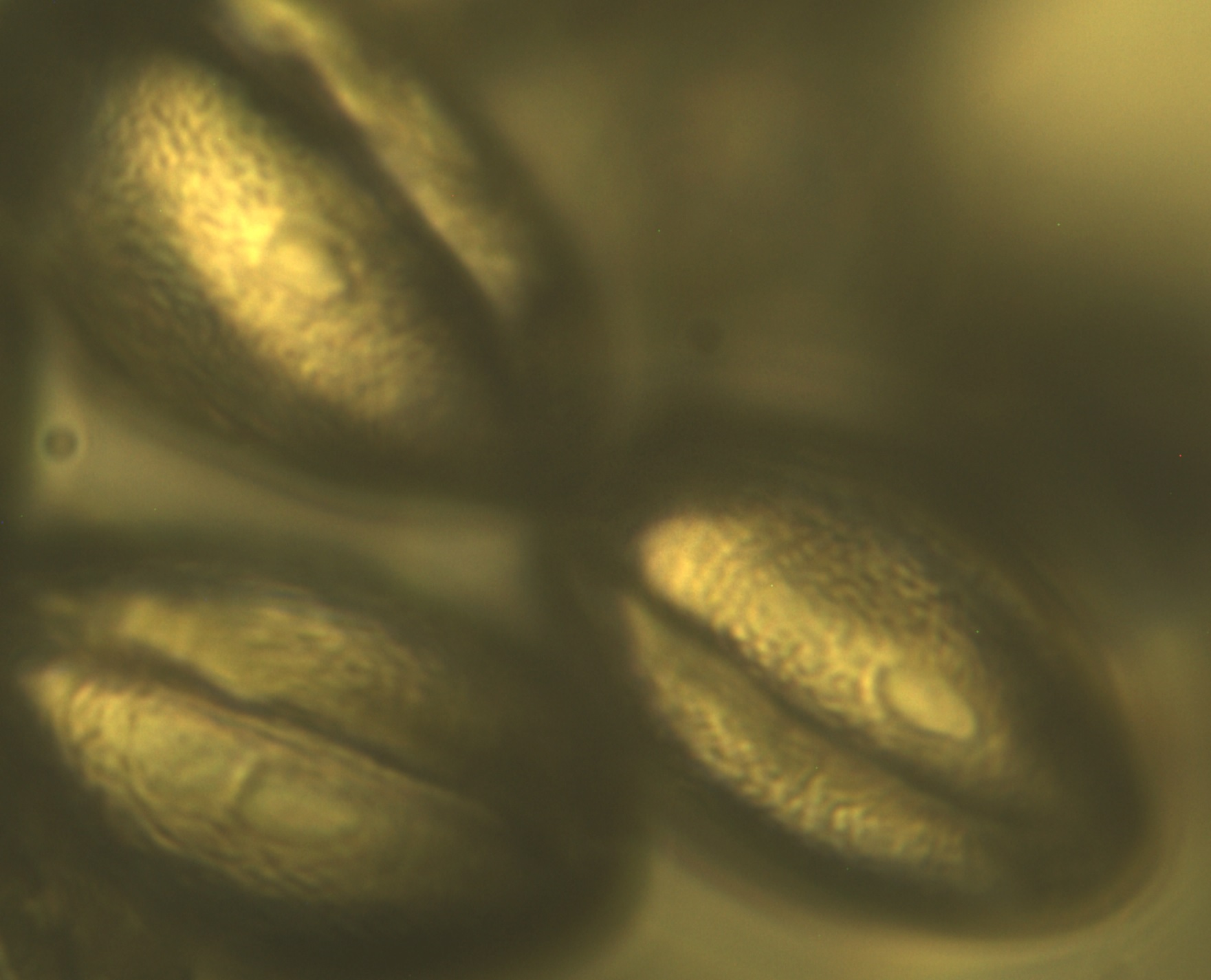 Pollen der Tabakpflanze (400×)